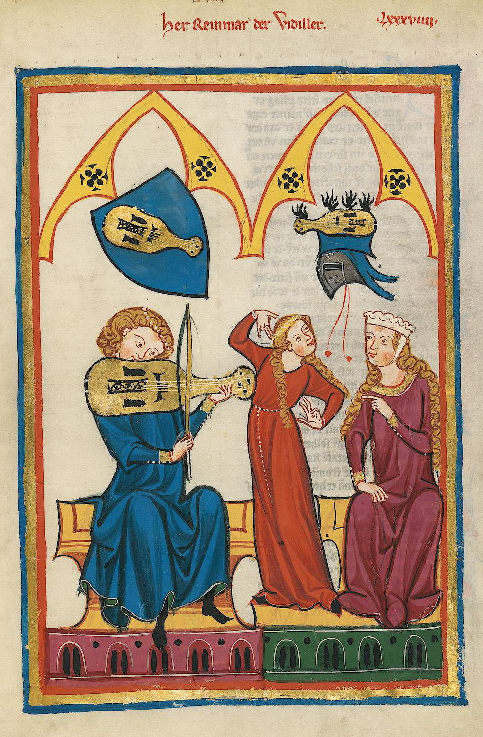 Codex Manesse, UB Heidelberg, Cod. Pal. germ. 848, fol. 312r: Reinmar der Fiedler